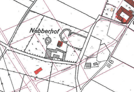 Lage des Nebbershofs in Hüls. In violett die ursprüngliche Straßenlage und die Flurstücke.